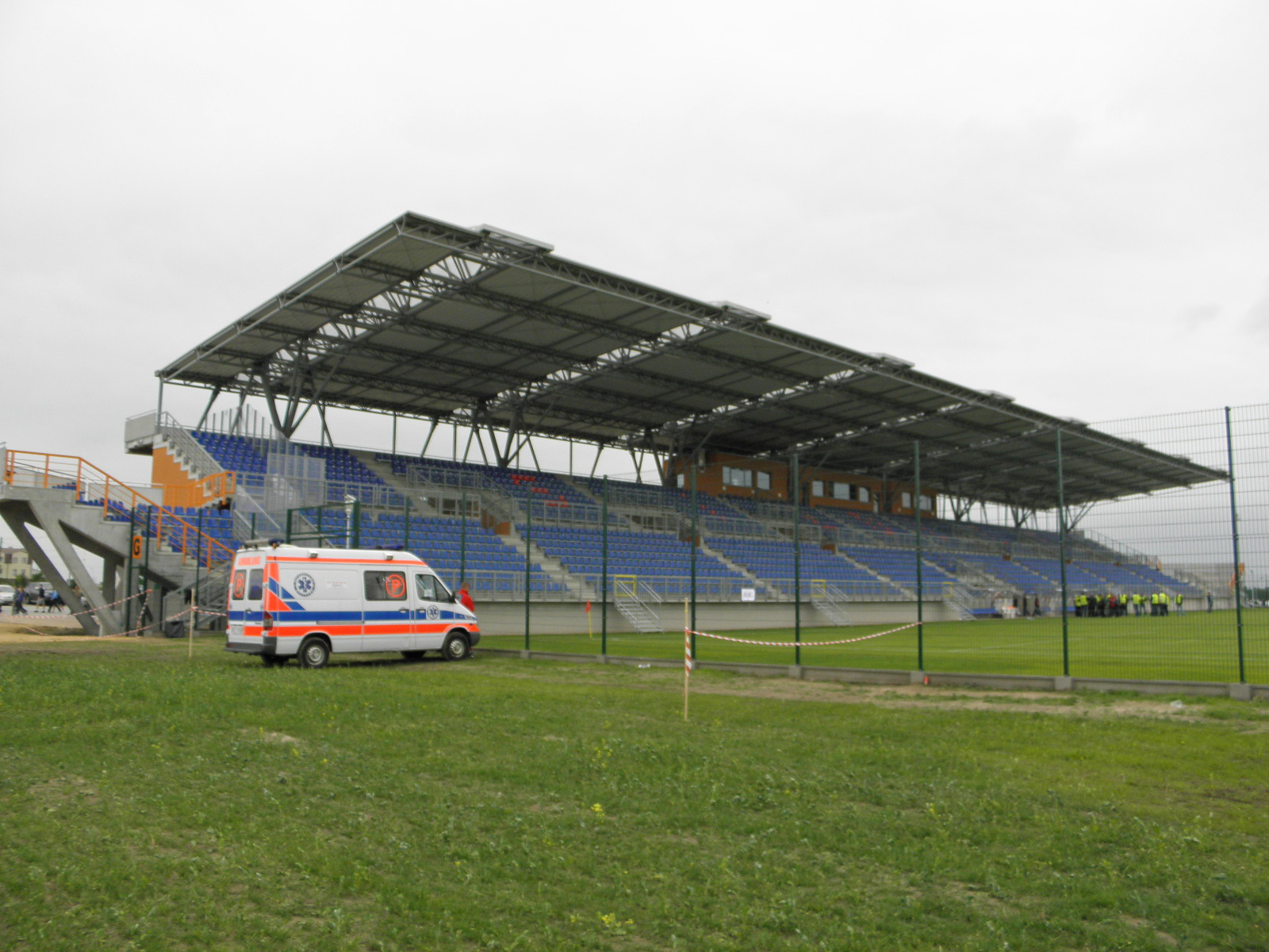 Siedlce-stadion na Błoniach-trybuna zachodnia